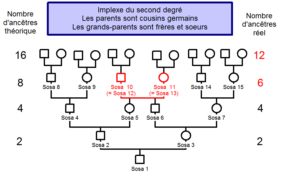 Exemple d'implexe avec 6 AGP / 8